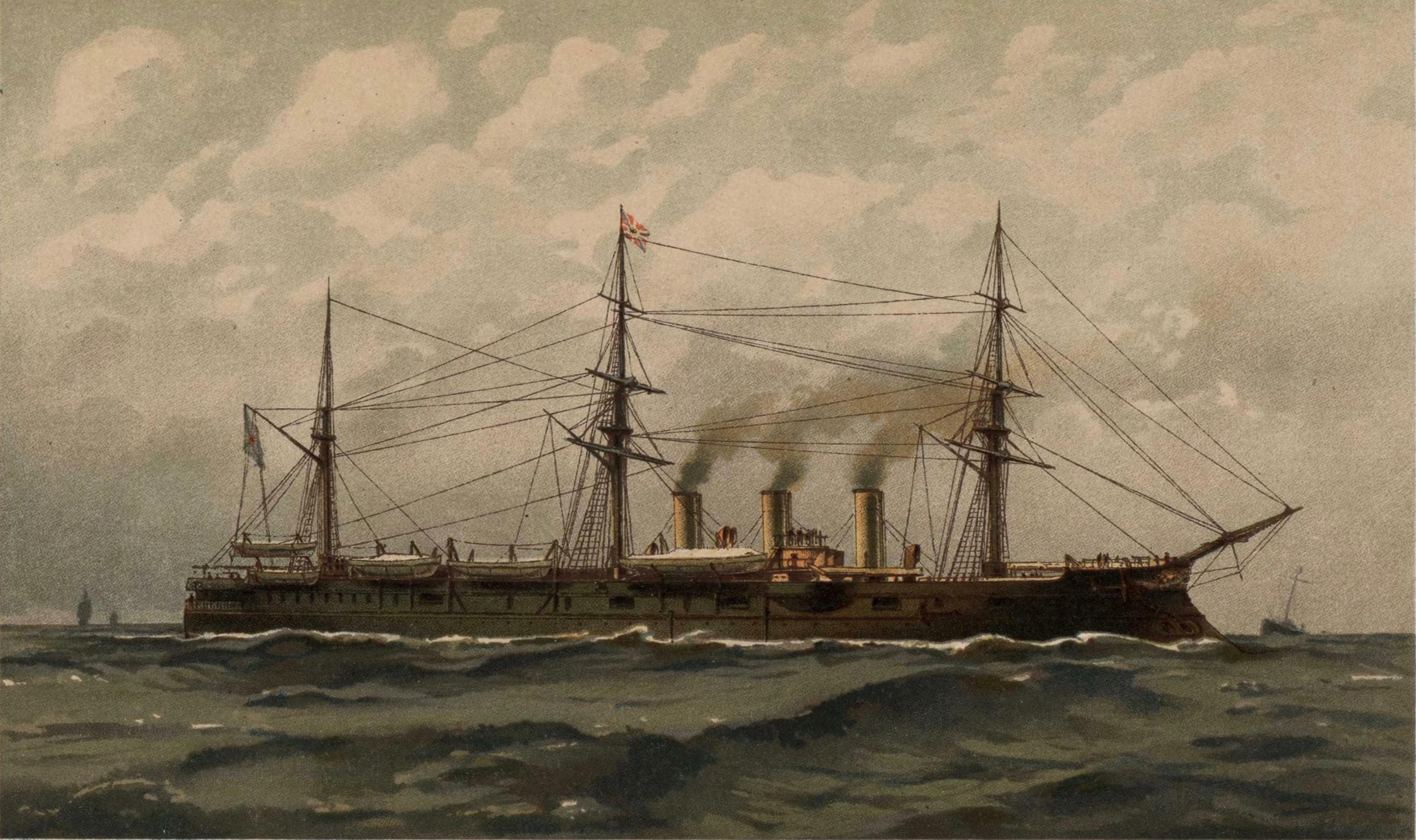 Pamiat Azova (armored cruiser)